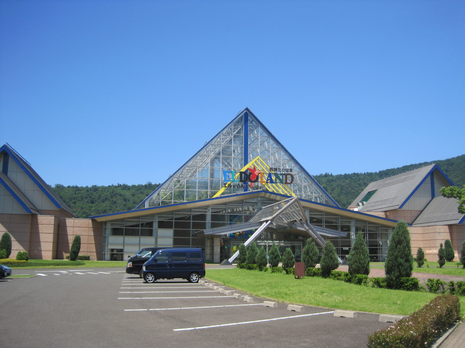 関西電力のPR施設「若狭たかはまエルどらんど」（福井県大飯郡高浜町）